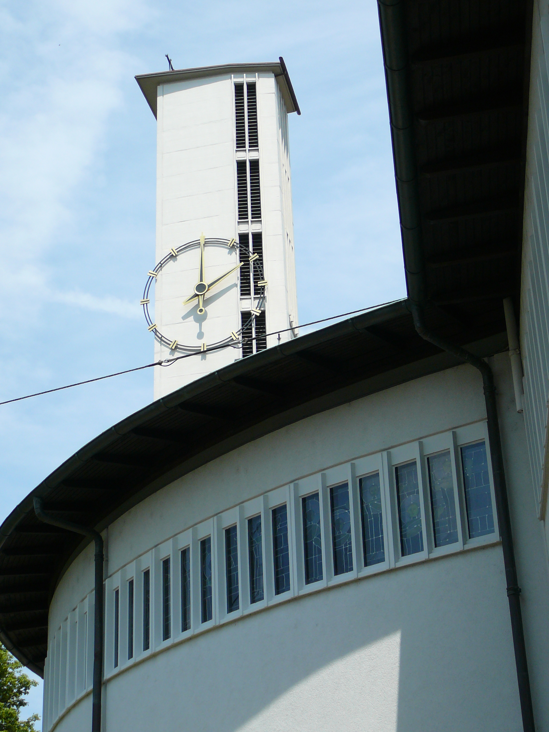 Römisch-katholische Kirche St. Felix und Regula, Zürich-Hard, Aussenansicht von der Hardstrasse